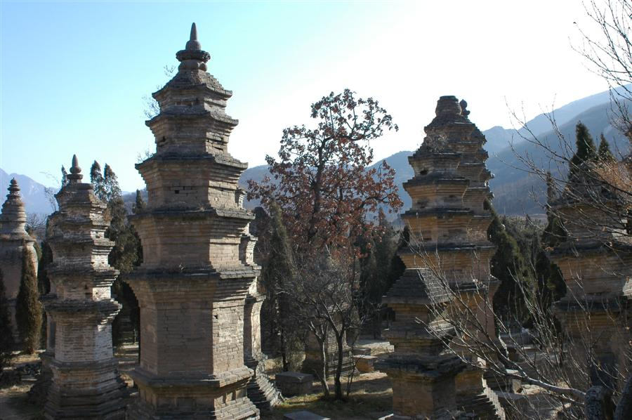 河南嵩山少林寺塔林